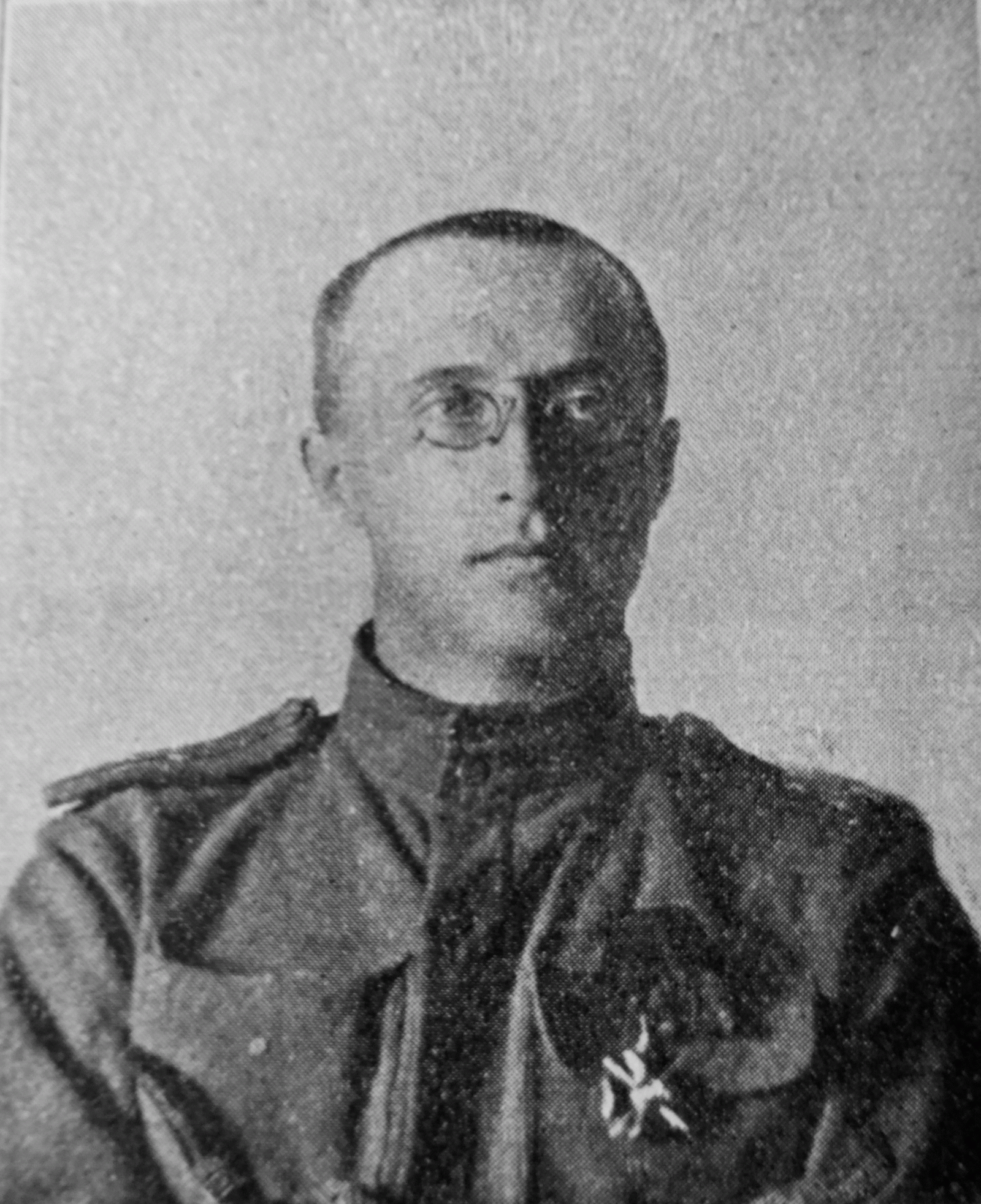 Otakar Husák (* 23. dubna 1885, Nymburk – 12. června 1964, Praha) byl československý generál, legionář a ministr obrany v letech 1920–1921. Na fotografii jako první český dobrovolník - důstojník československých legií v Rusku. Foto před rokem 1919.